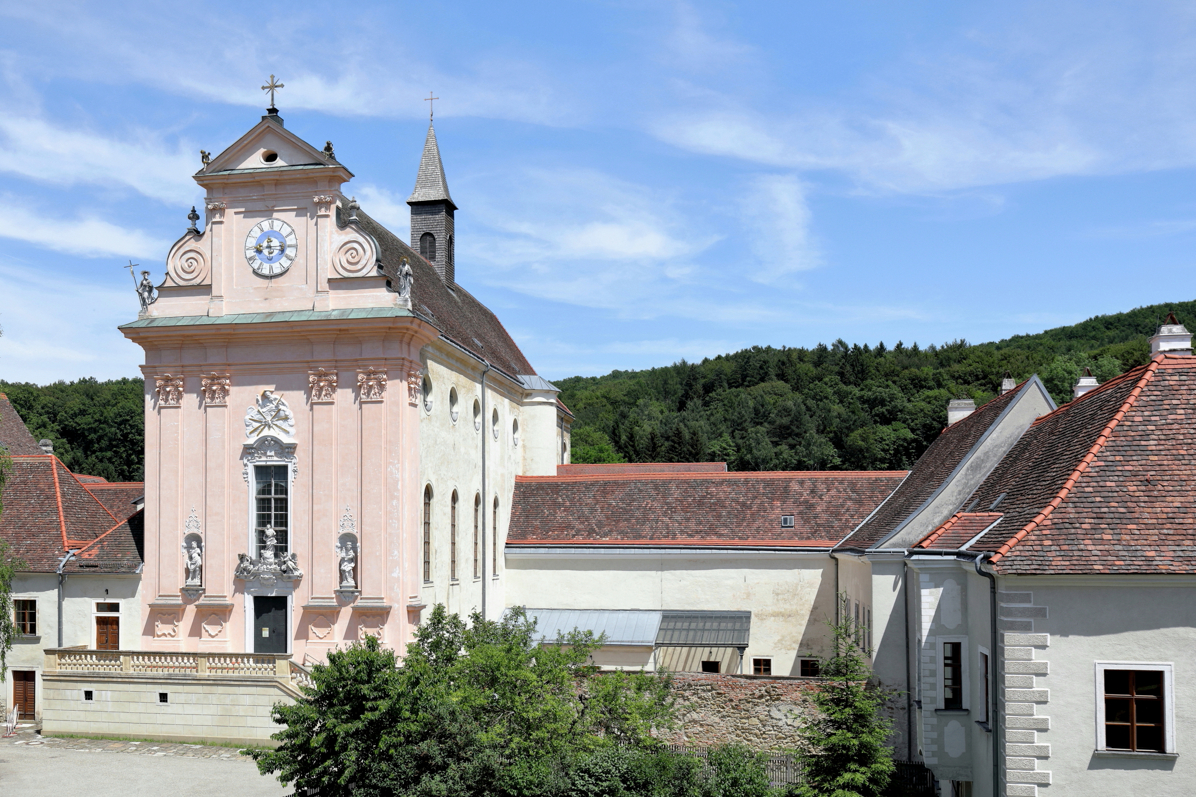 Links die Klosterkirche und rechts der Prälatenhof der Kartause in der niederösterreichischen Marktgemeinde Mauerbach.Die Kartause wurde um 1315 durch Herzog Friedrich den Schönen gestiftet und 1782 durch Kaiser Joseph II. geschlossen. Die Klosterkirche wurde ab etwa 1616 neu gebaut, 1683 zerstört und nachher wieder instandgesetzt.